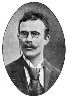 Richard Nordhausen (1848–1942), deutscher Literaturschaffender